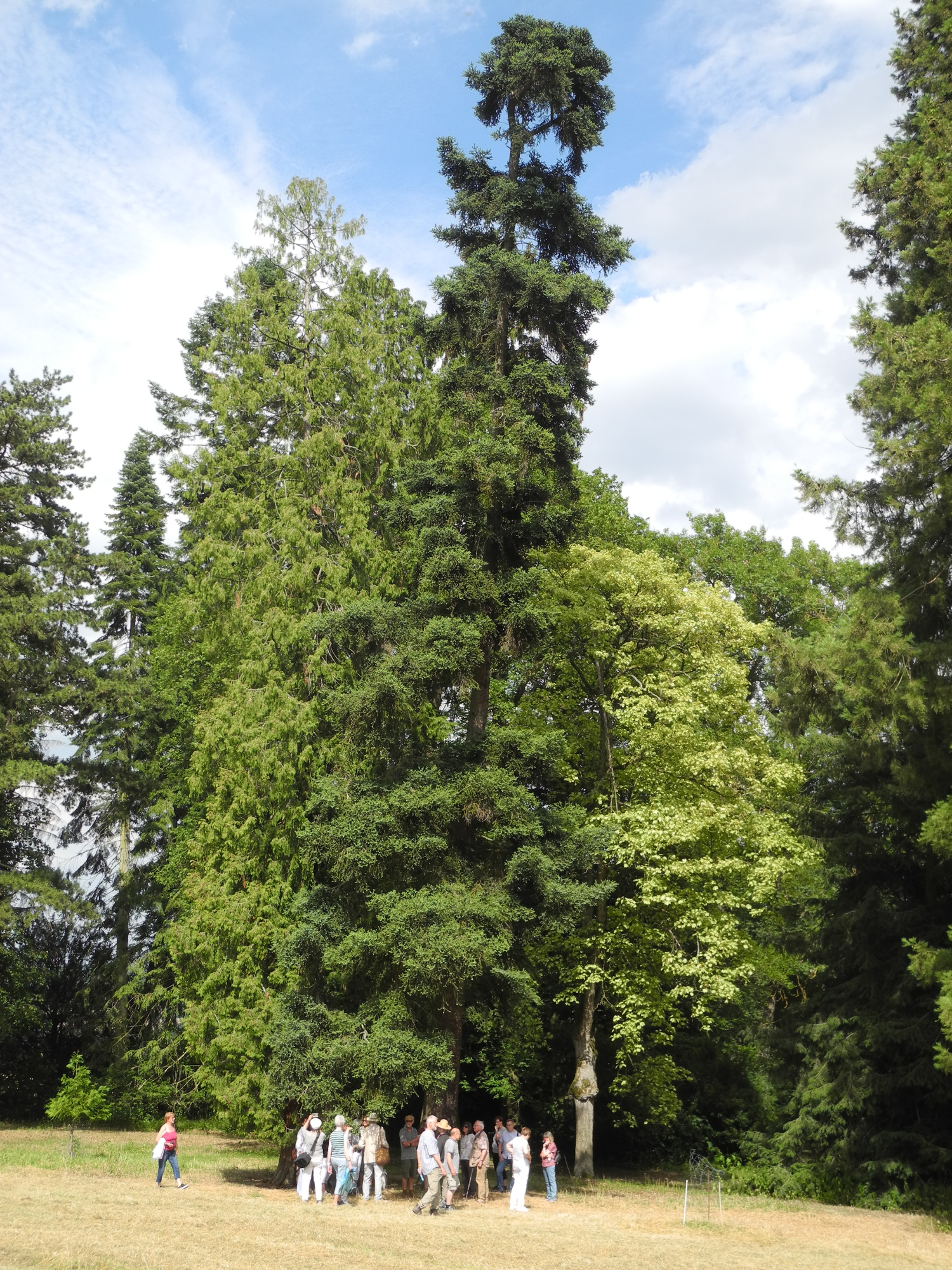 Baum 13 im Schlosspark Riede, Hessen, Deutschland. Art: Spanische Tanne (Abies pinsapo)